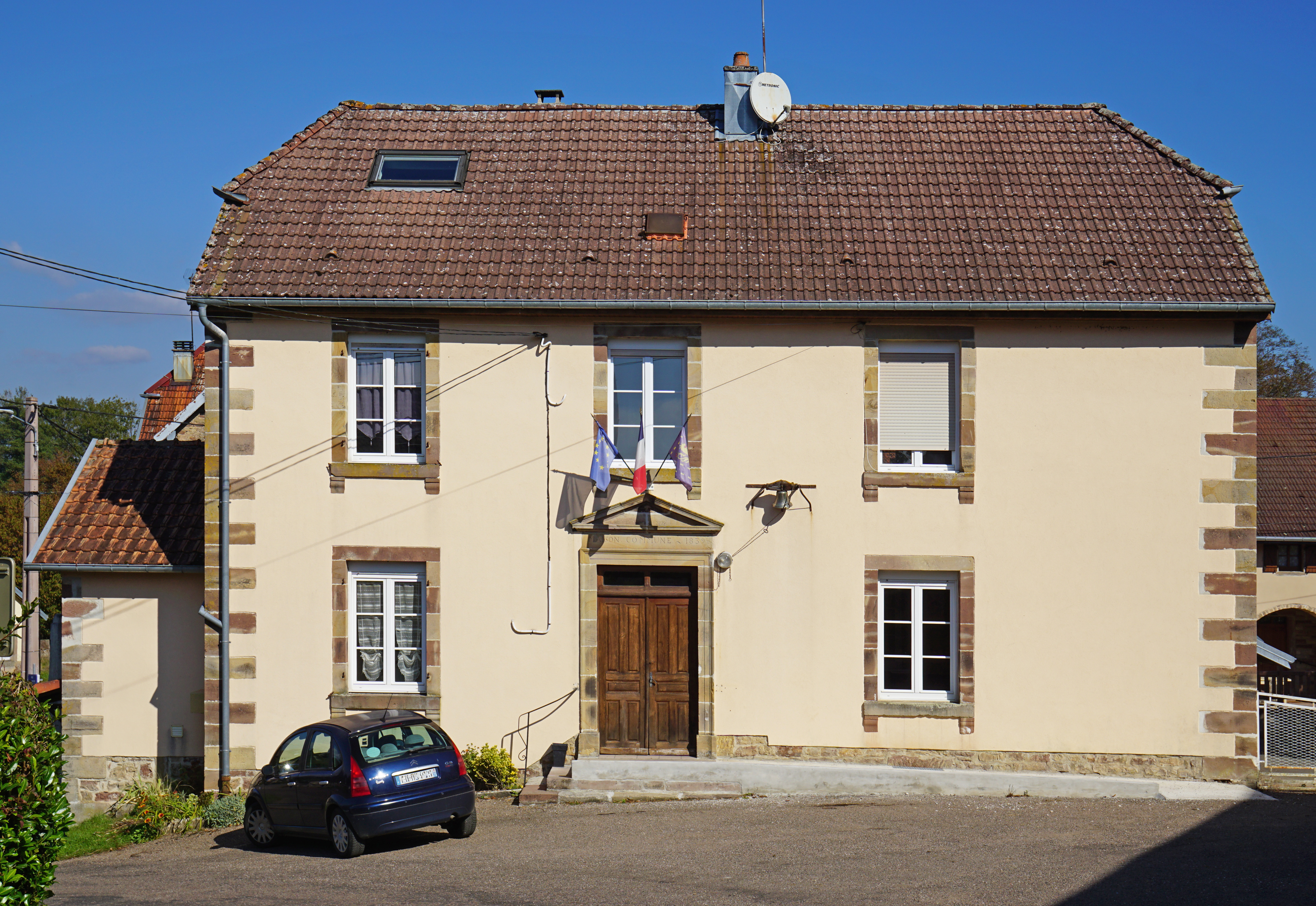 La mairie de Magny-Jobert.